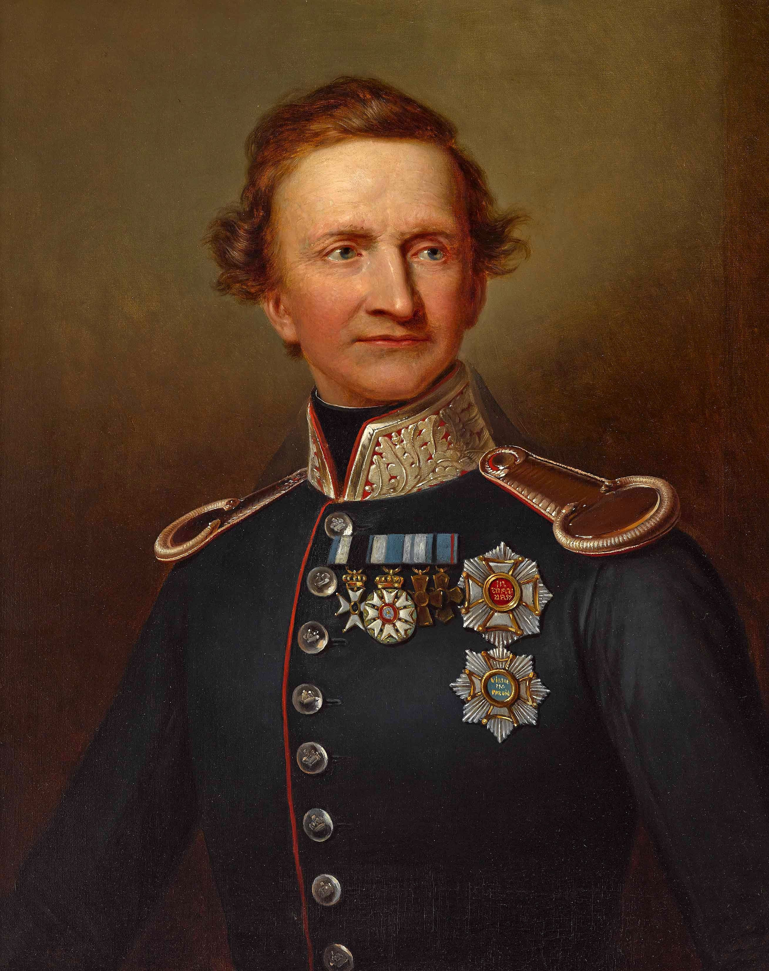 König Ludwig I. von Bayern